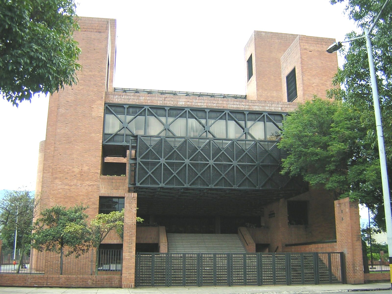 Teatro Metropolitano de Medellín, Colombia